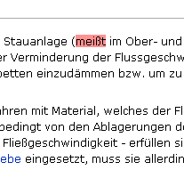 Beispiel der JavaScript-Rechtschreibprüfung Screenshot aus dem Artikel Geröllsperre in der Version vom 14. Juli 2005, 21:10 Uhr